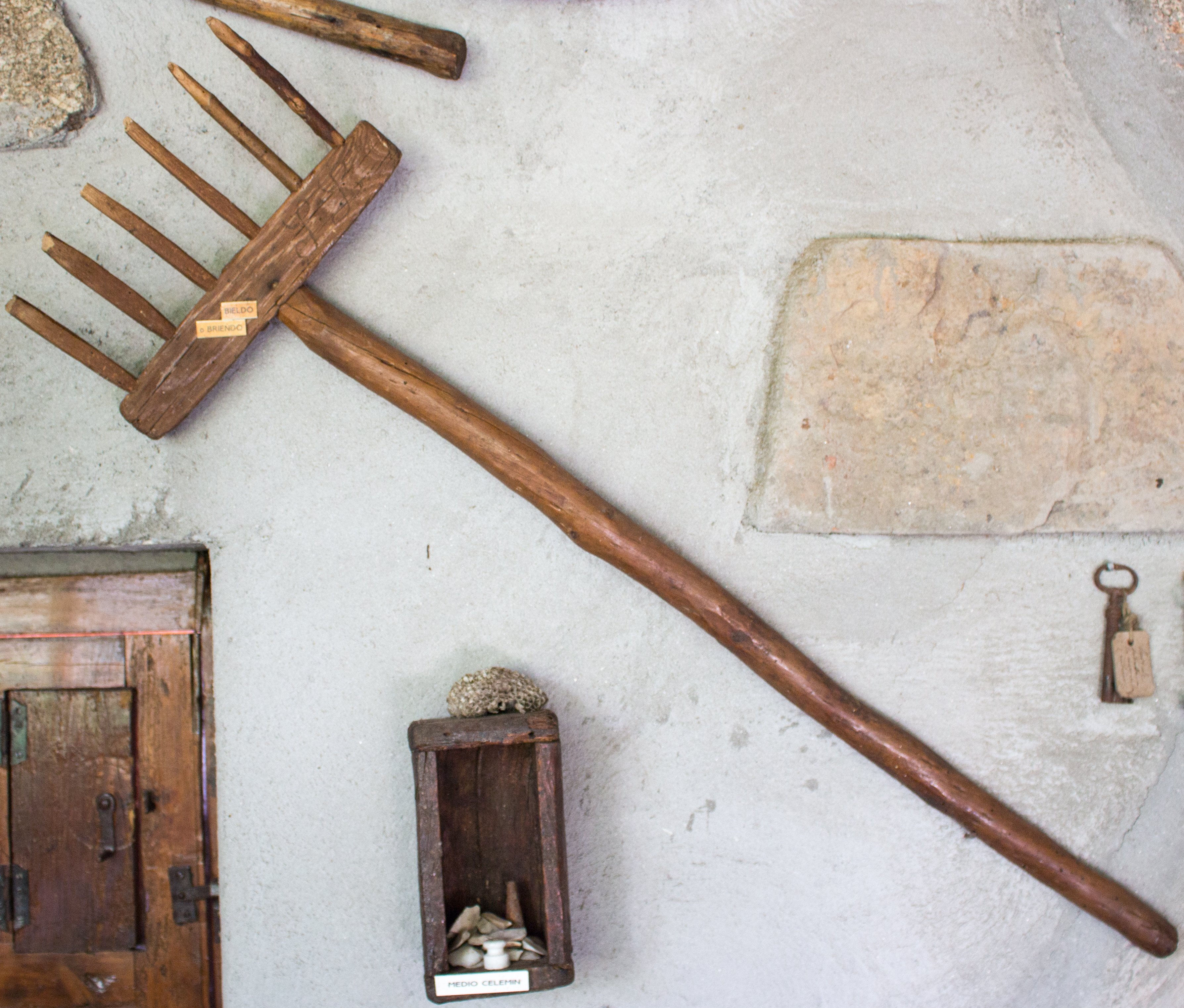 En Castilla el bieldo se usaba para aventar el trigo desgranado en la trilla, separando el grano de la paja. También se usaba para preparar la parva, amontonar la paja. [Información proporcionada por D. Javier Perals, responsable del Museo Etnológico de Puerto Seguro]